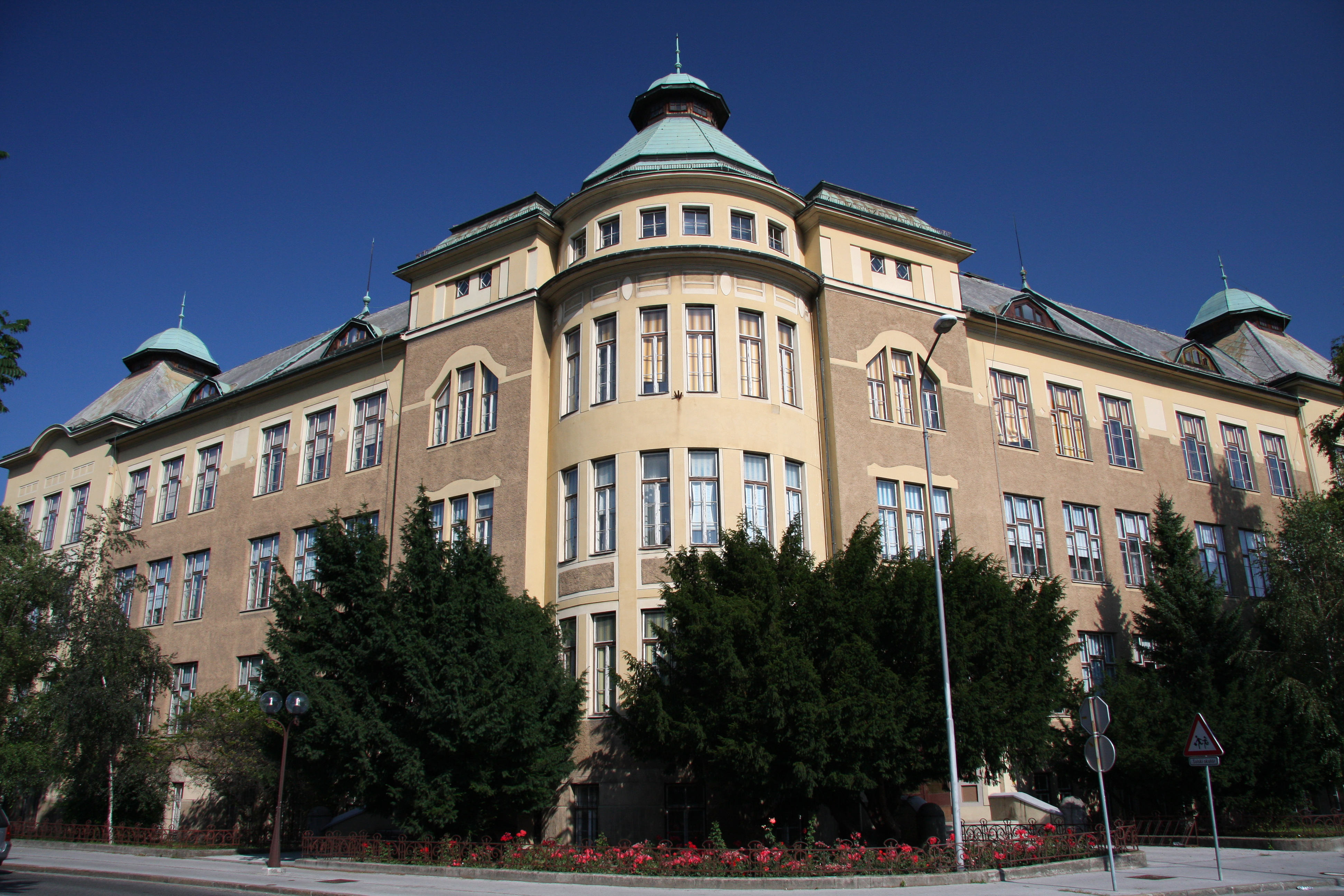 Gimnazija Celje - Center